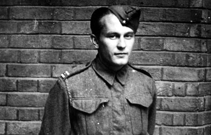 účastník operace Out Distance